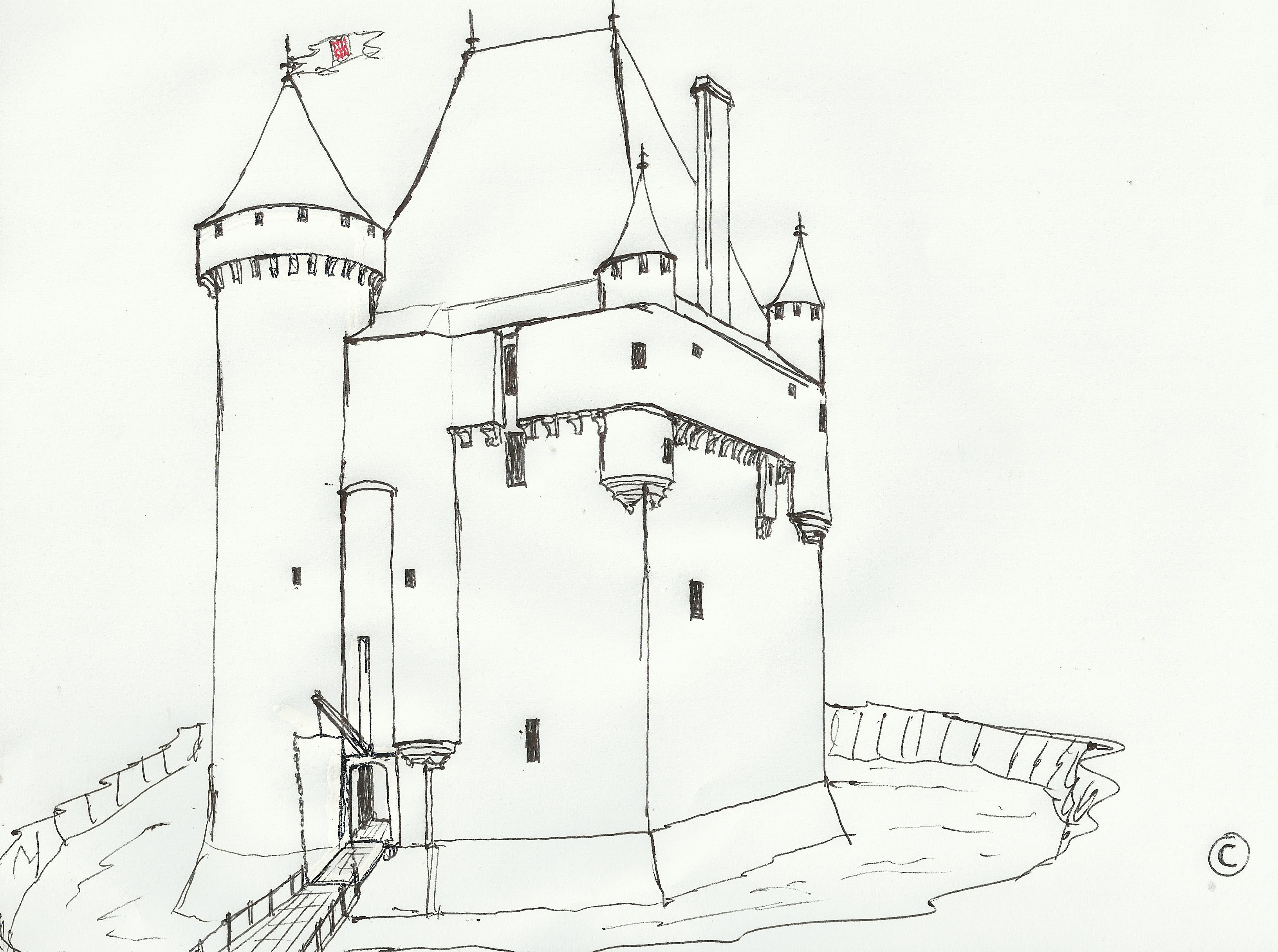 Croquis montrant la Tour de Moricq telle qu'elle pouvait être au XVe siècle, largement inspiré d'un croquis montré par Mr Gorphe.